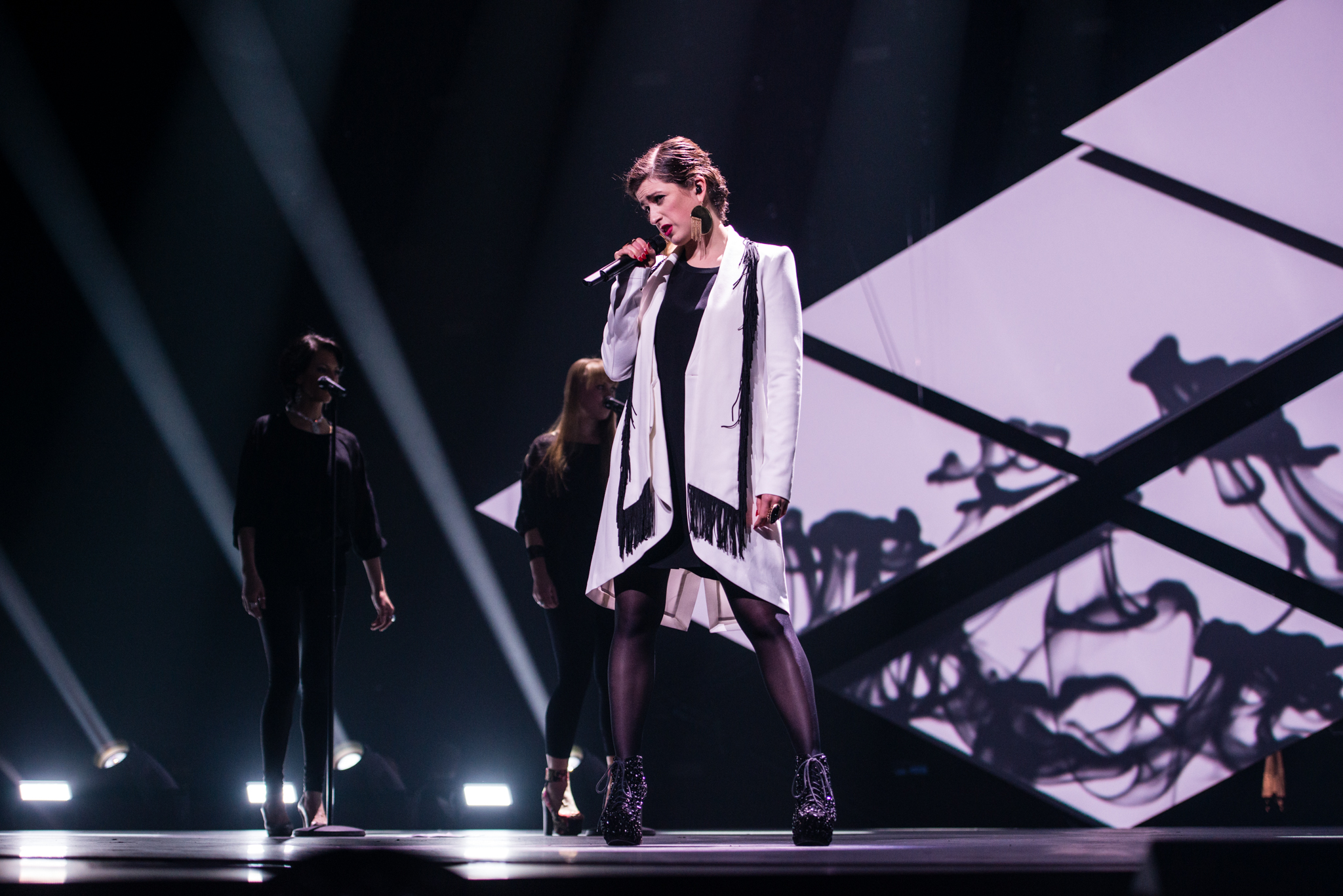 'Eurovision Song Contest 2015 - Unser Song für Österreich': 'Ann Sophie'